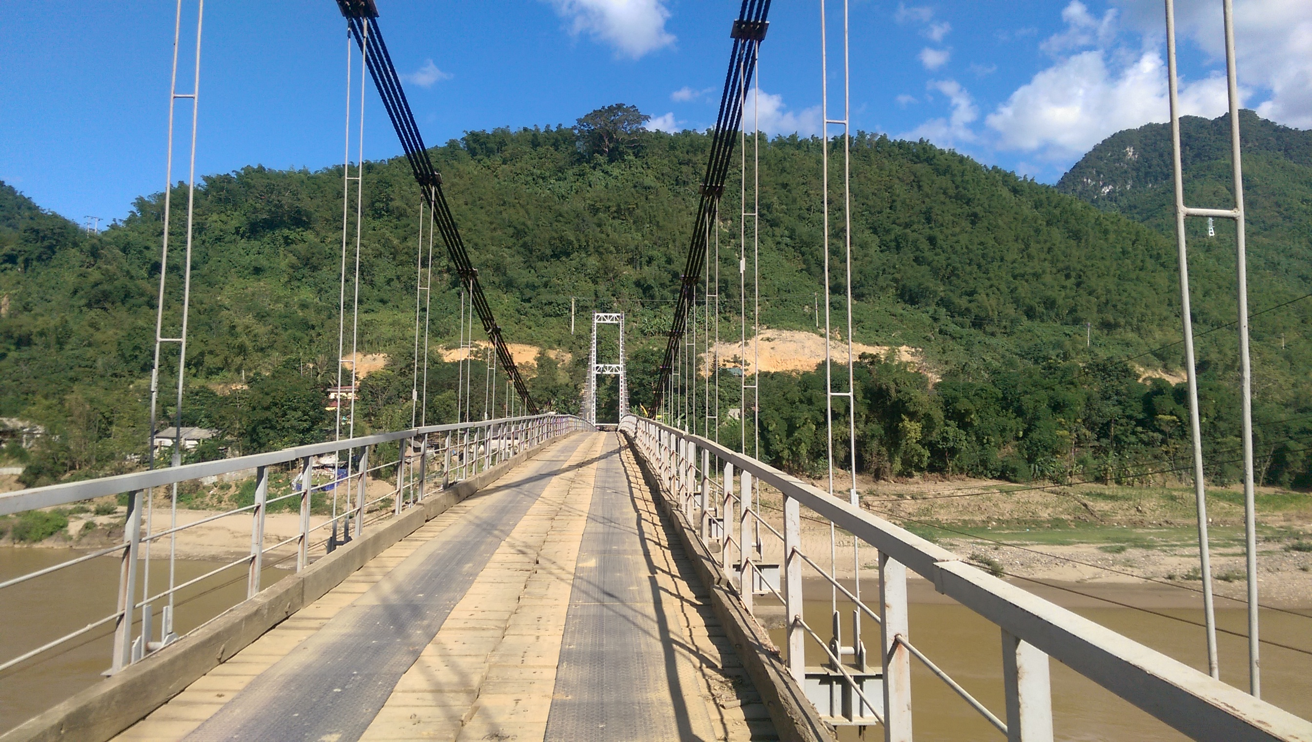 Cầu treo Phú Lệ, Quan Hóa, Thanh Hóa